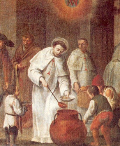 Simón de Rojas dando de comer a los pobres, cuadro del s. XVII